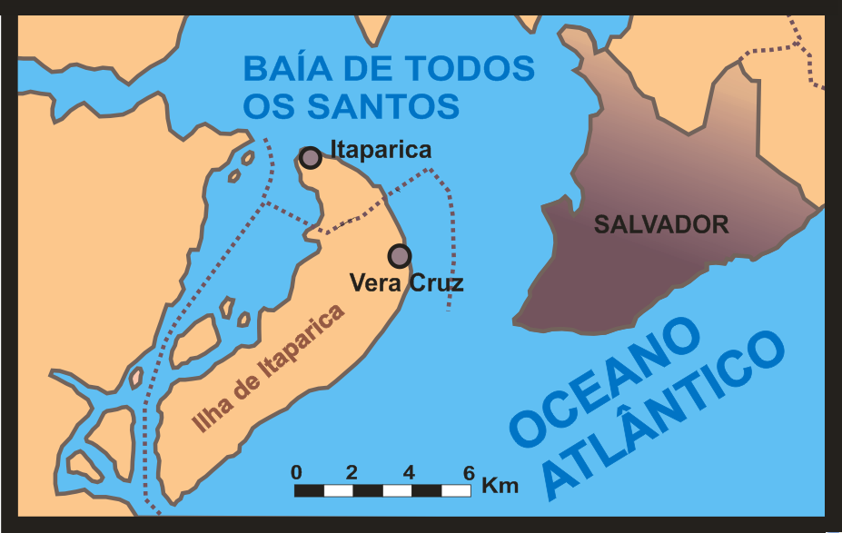 Mapa da Ilha de Itaparica (Itaparica Island, Bahia, Brazil)